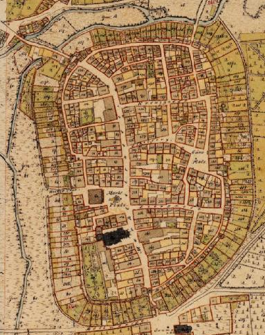 Kartenausschnitt Urkataster Bayern, Altstadt Volkach, 1833